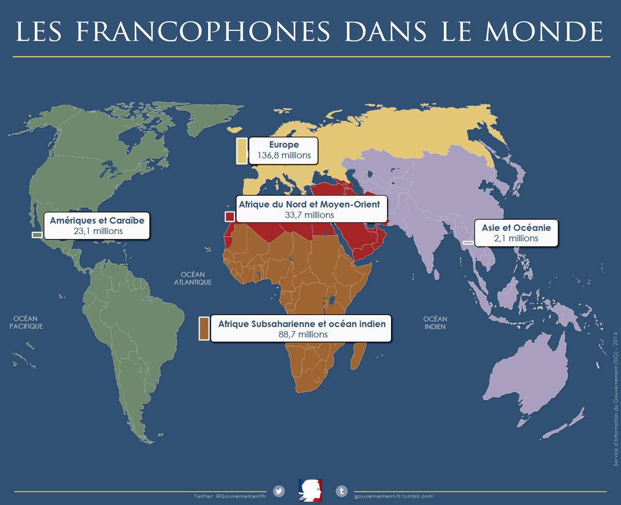 Infographique représentant le nombre de francophones par continent en 2015.